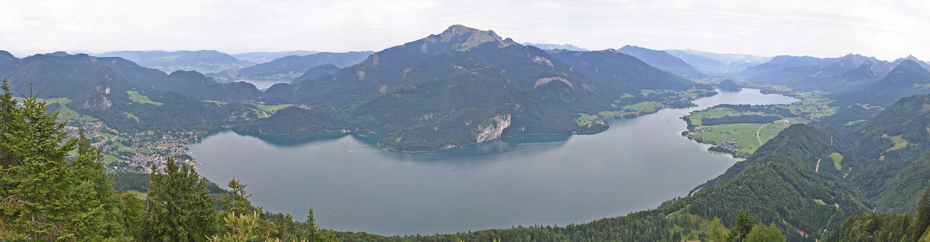 Panoramablick vom Elferstein im Salzkammergut über den Wolfgangsee. Links im Bild liegt St. Gilgen, rechts vor dem Schafberg liegt St. Wolfgang.